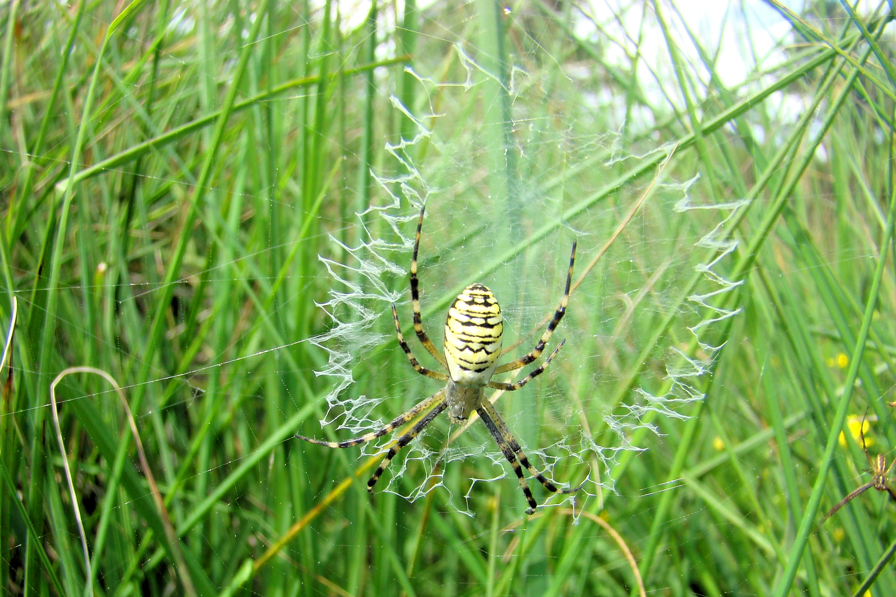 Wespenspinne, Weibchen, mit kreisförmiger Anordng. d. Zickzacklinien